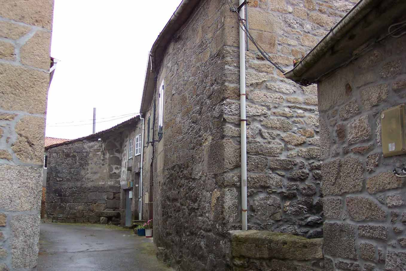 Rúa do lugar de Trasar de Caballo, Carballedo, Lugo, Galiza